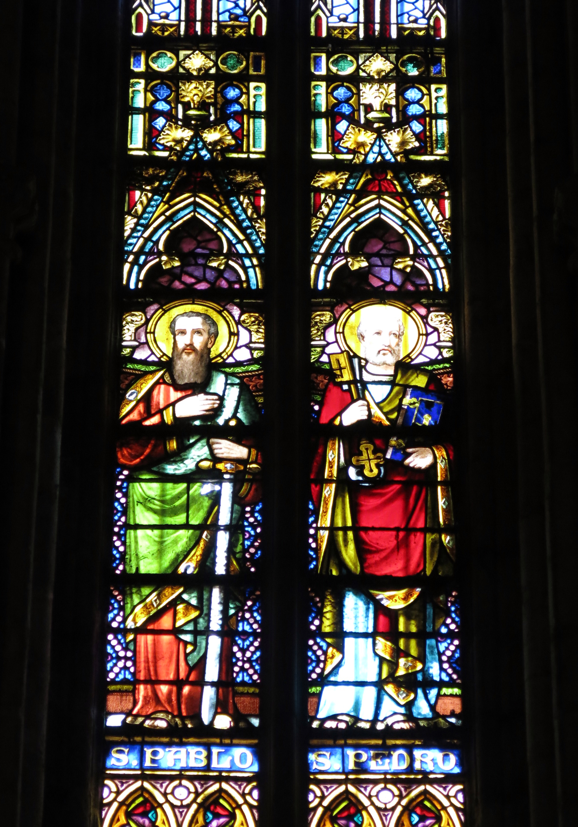 Catedral de Santa Maria (Girona)